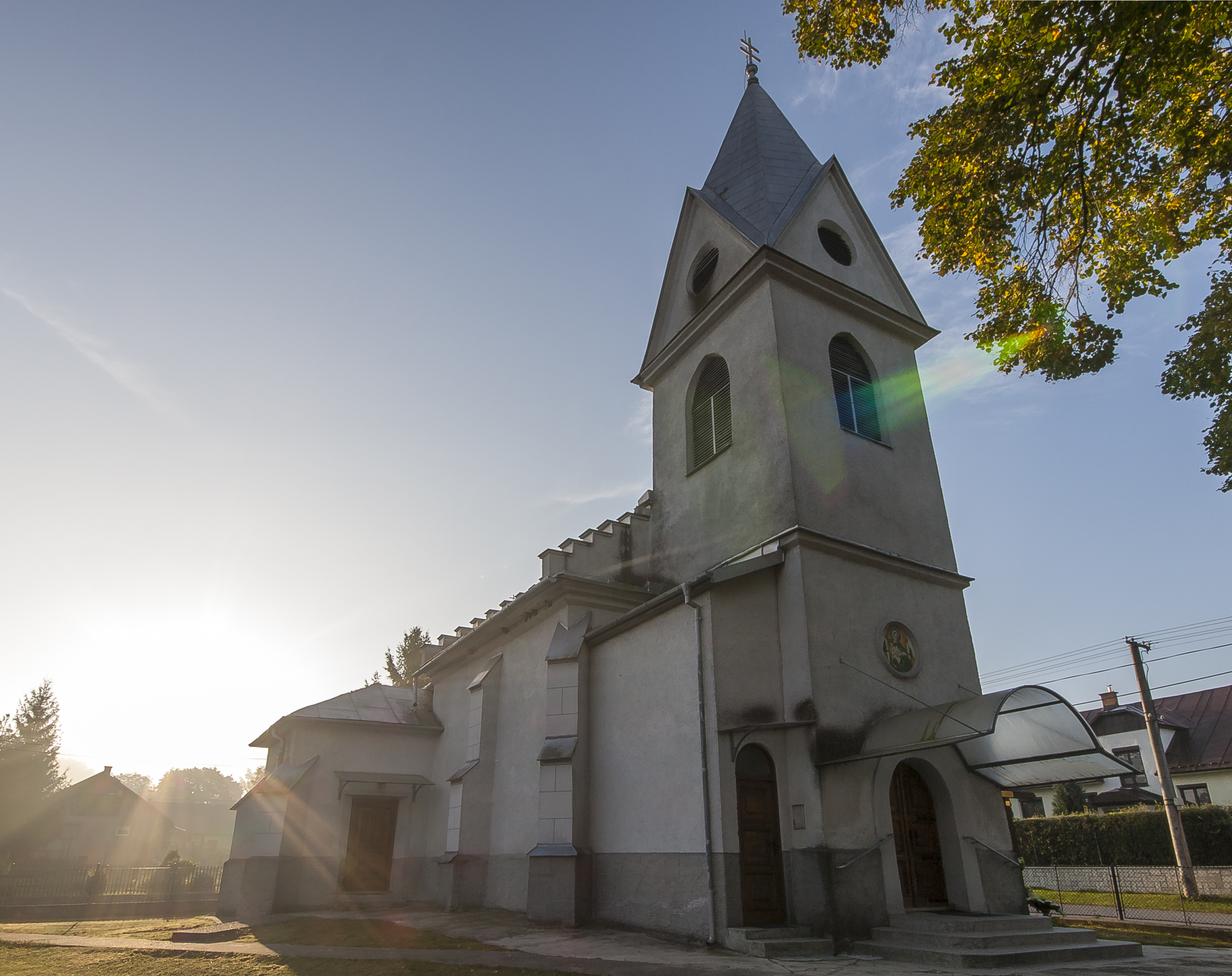 pohľad zo severu